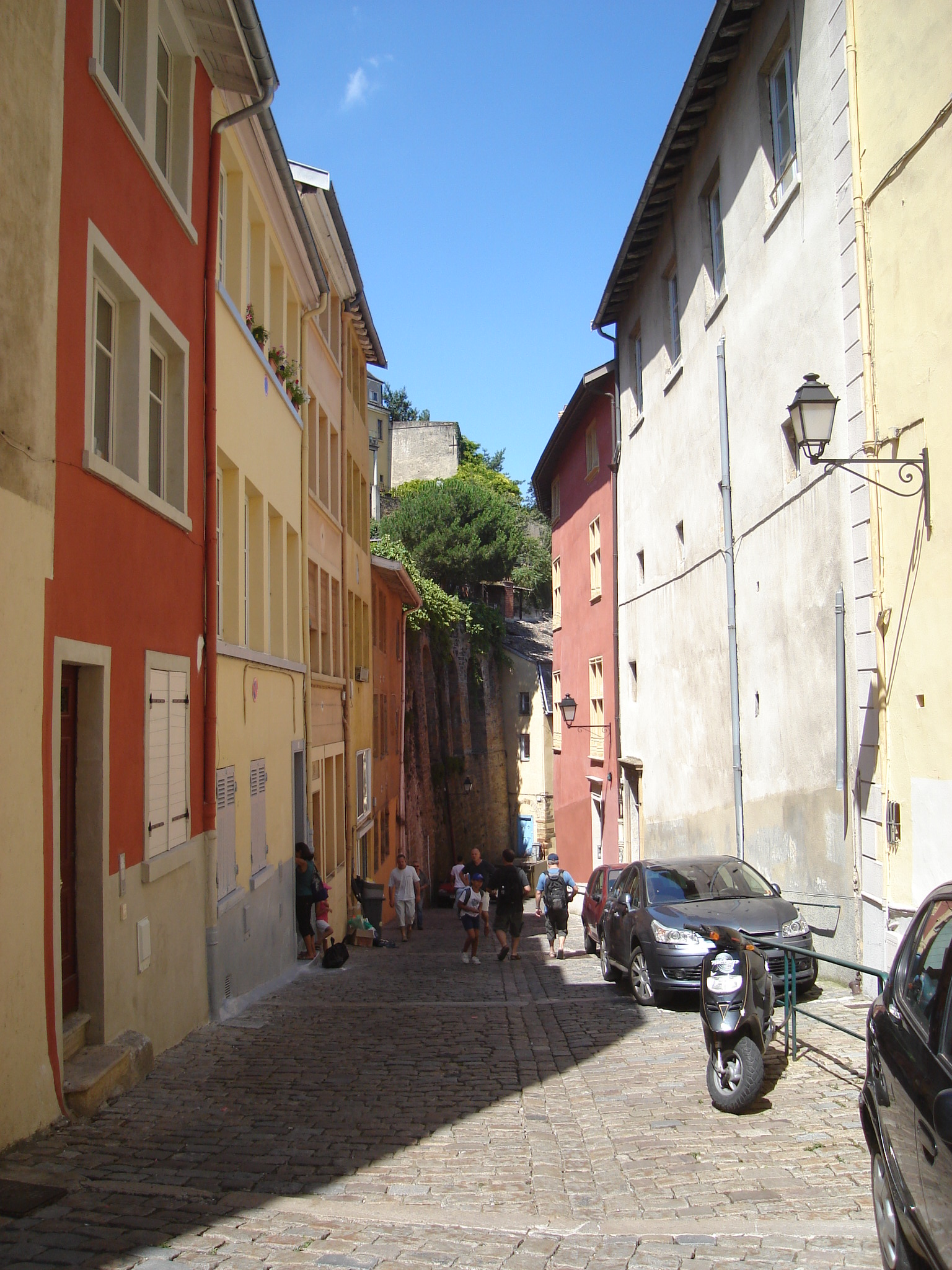 Montée du Gourguillon, Lyon